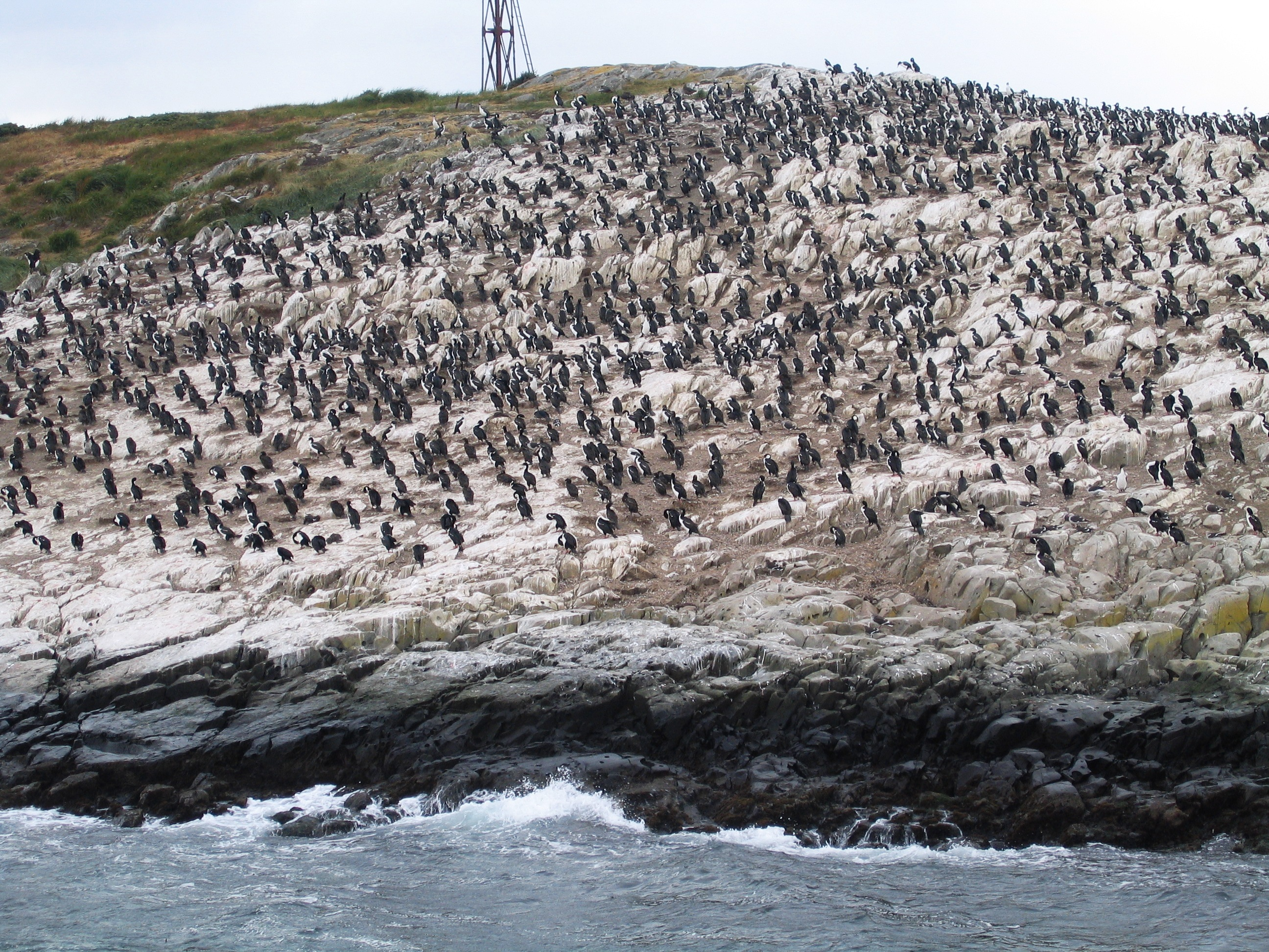 Canal de Beagle - Cormorants